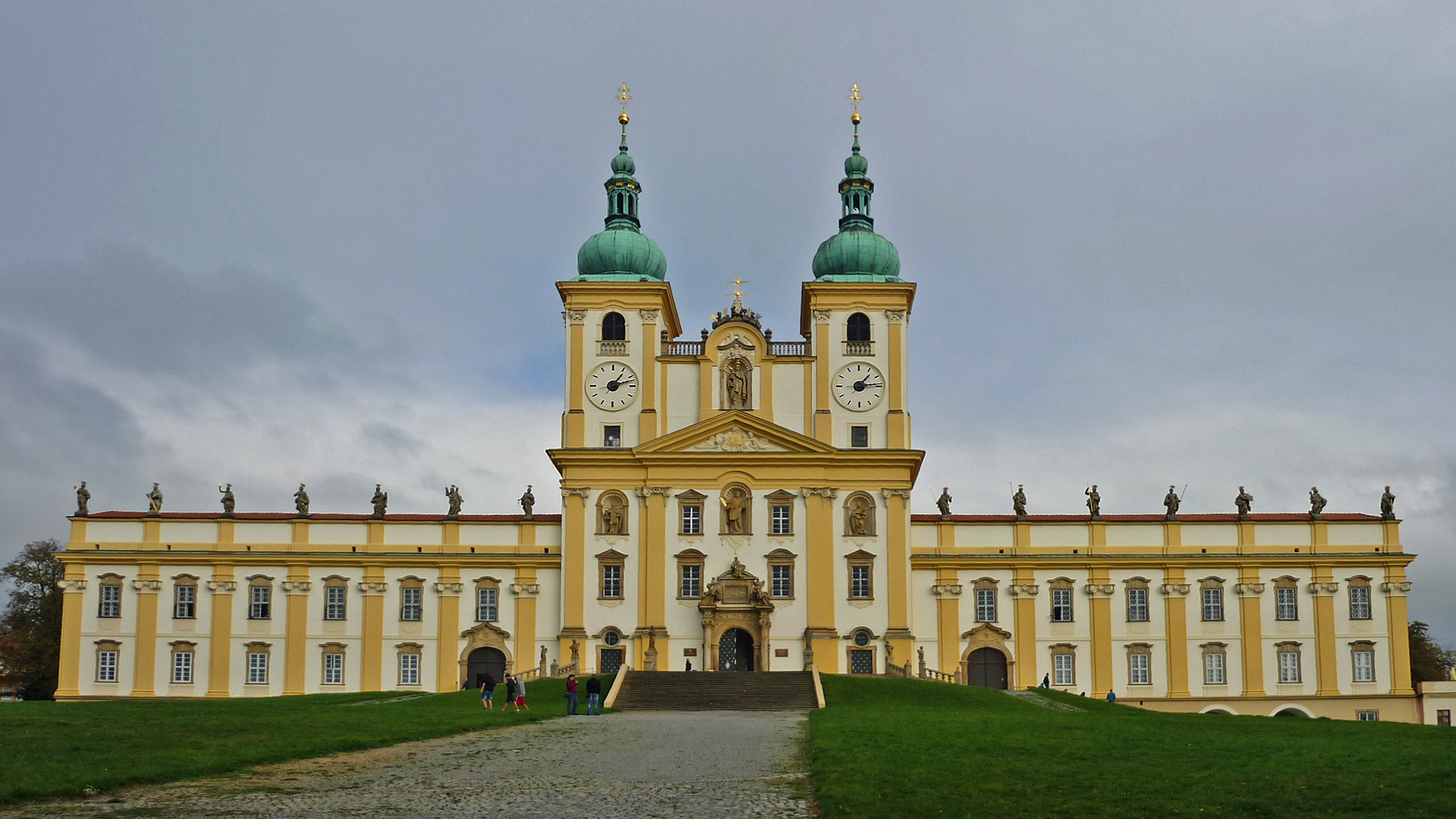 Wallfahrtskirche Mariä Heimsuchung auf dem Heiligenberg (Svatý Kopeček) bei Olmütz (Olomouc) in Mähren